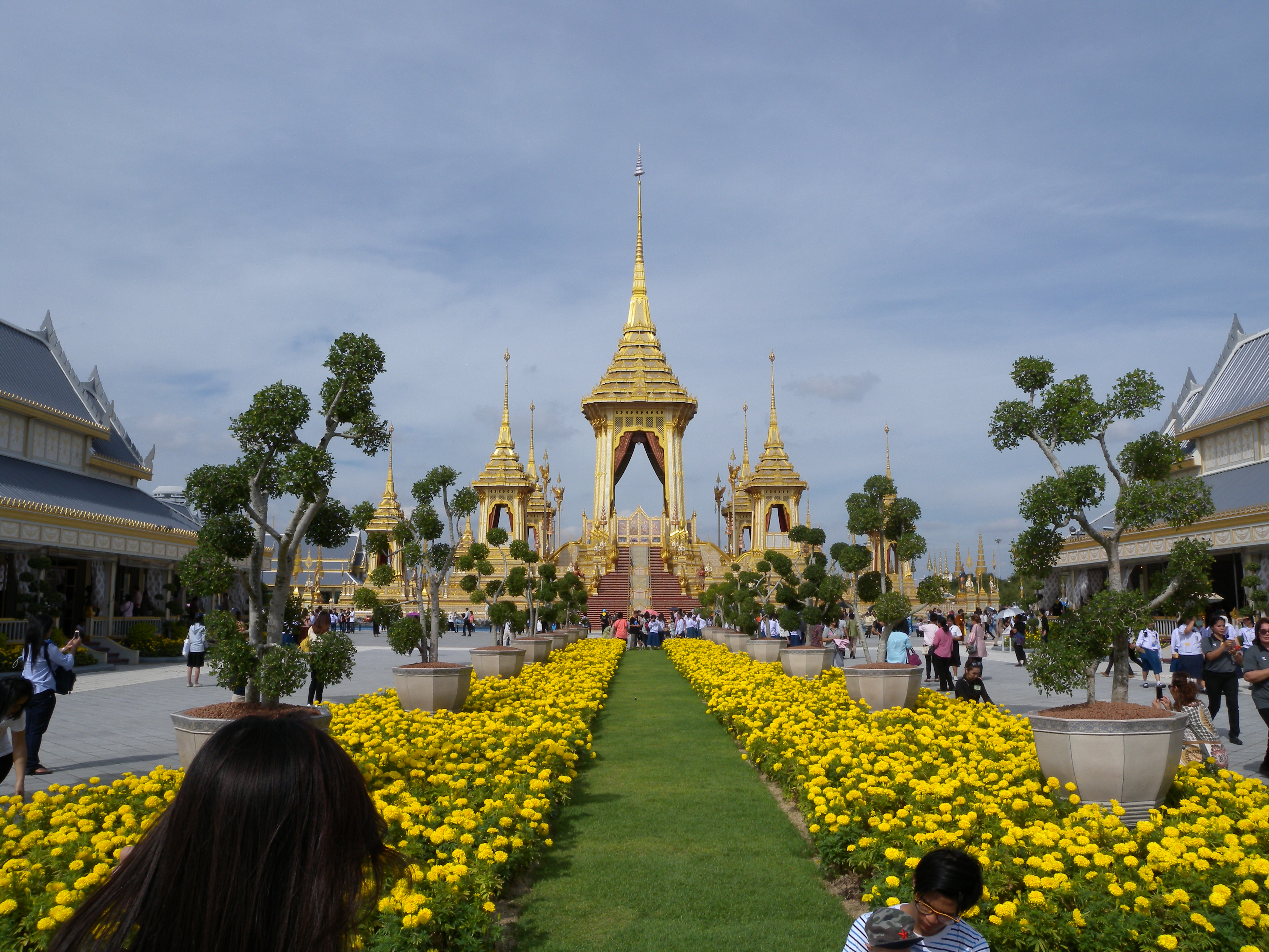 พระเมรุมาศสำหรับพระราชพิธีถวายพระเพลิงพระบรมศพ พระบาทสมเด็จพระปรมินทรมหาภูมิพลอดุลยเดช สยามินทราธิราช บรมนาถบพิตร ณ ท้องสนามหลวง กรุงเทพฯ บันทึกภาพเมื่อวันที่ 21 พฤศจิกายน พ.ศ. 2560